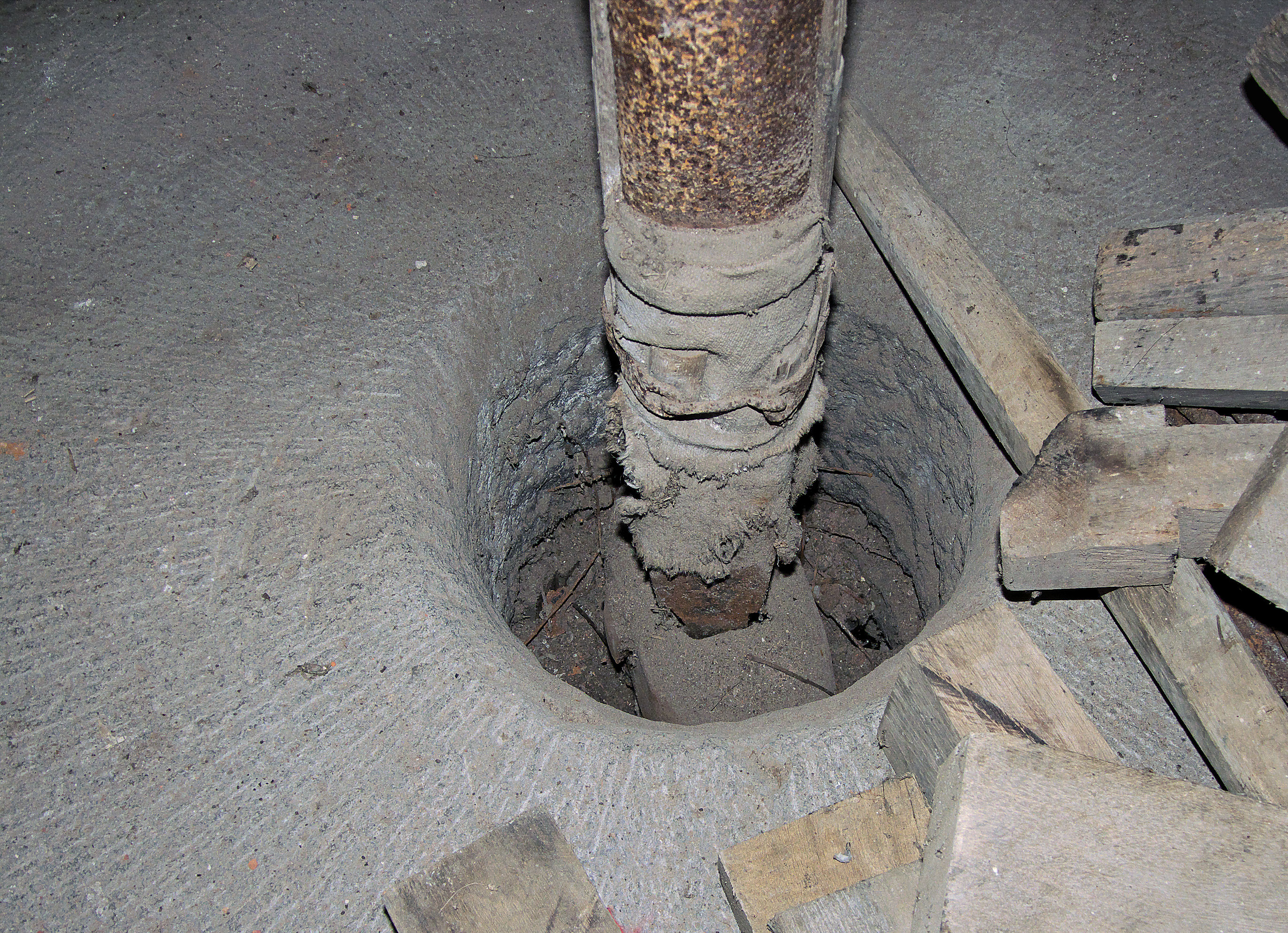 Molen Turmwindmühle Werth, Duitsland: kropgat met balanceerrijn